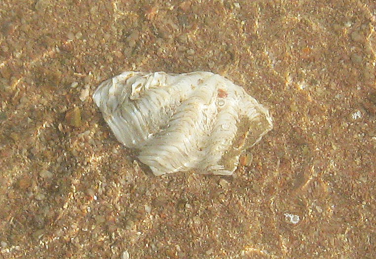 Muszla z Morza Czerwonego